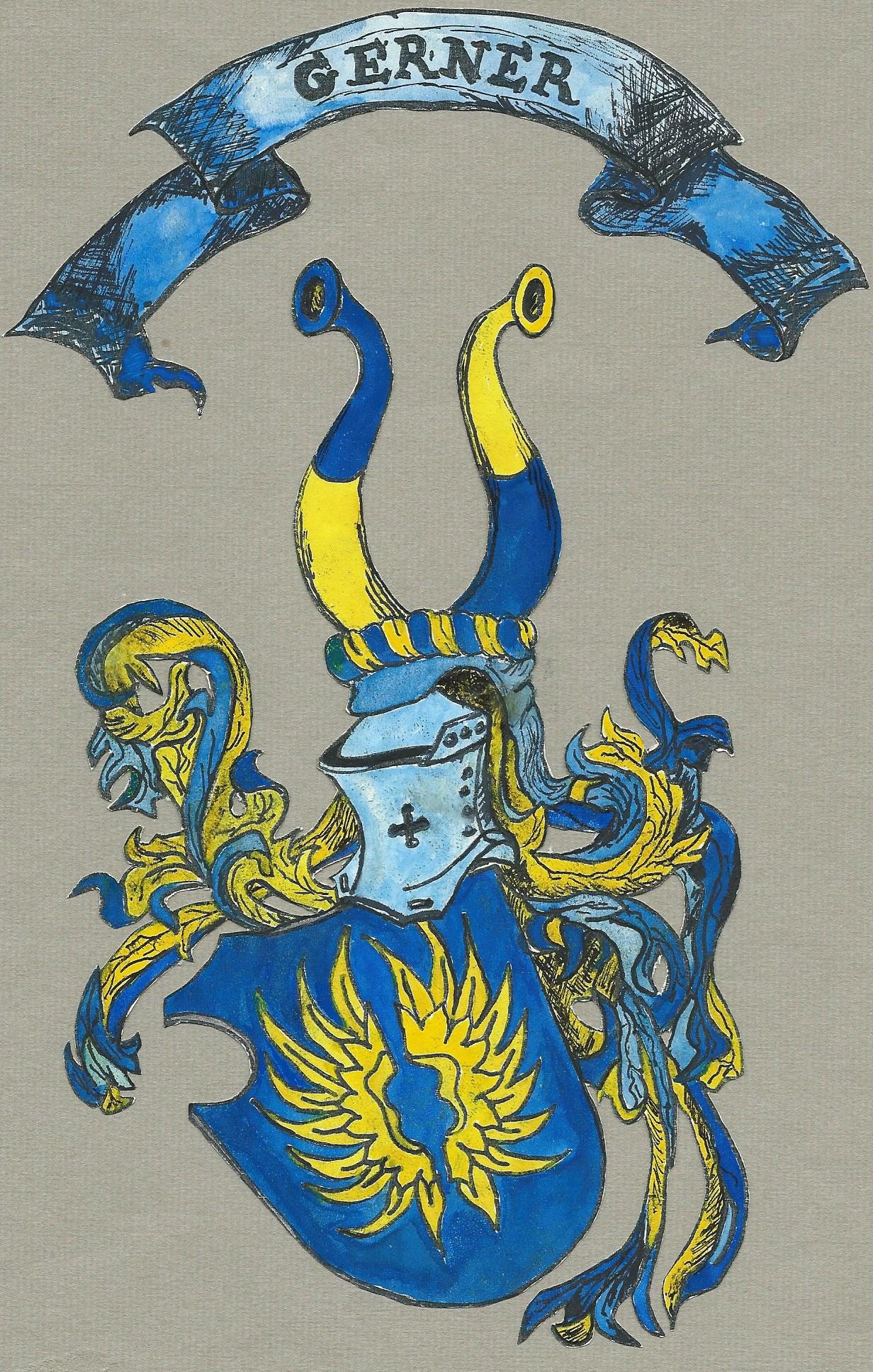 1640 wird in der Nobilitation zum Adelstitel für Abraham Gerner von Lilienstein durch Ferdinandt den Dritten das vorherige bürgerliche Wappen der Gerner wie abgebildet beschrieben. Nachgestaltet und gezeichnet durch Jürgen Gerner